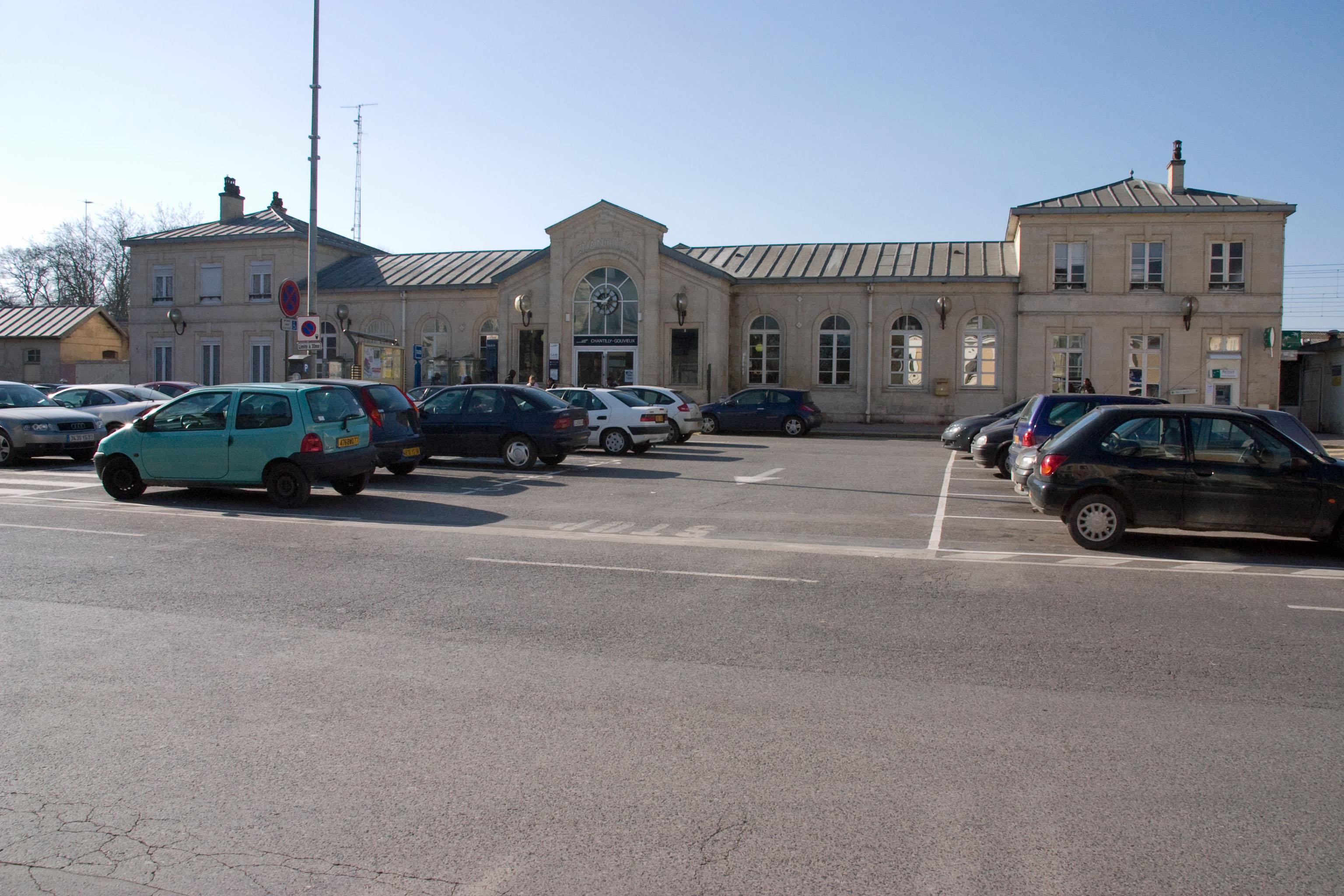 Gare de Chantilly - Gouvieux, Chantilly, département de l'Oise (France)